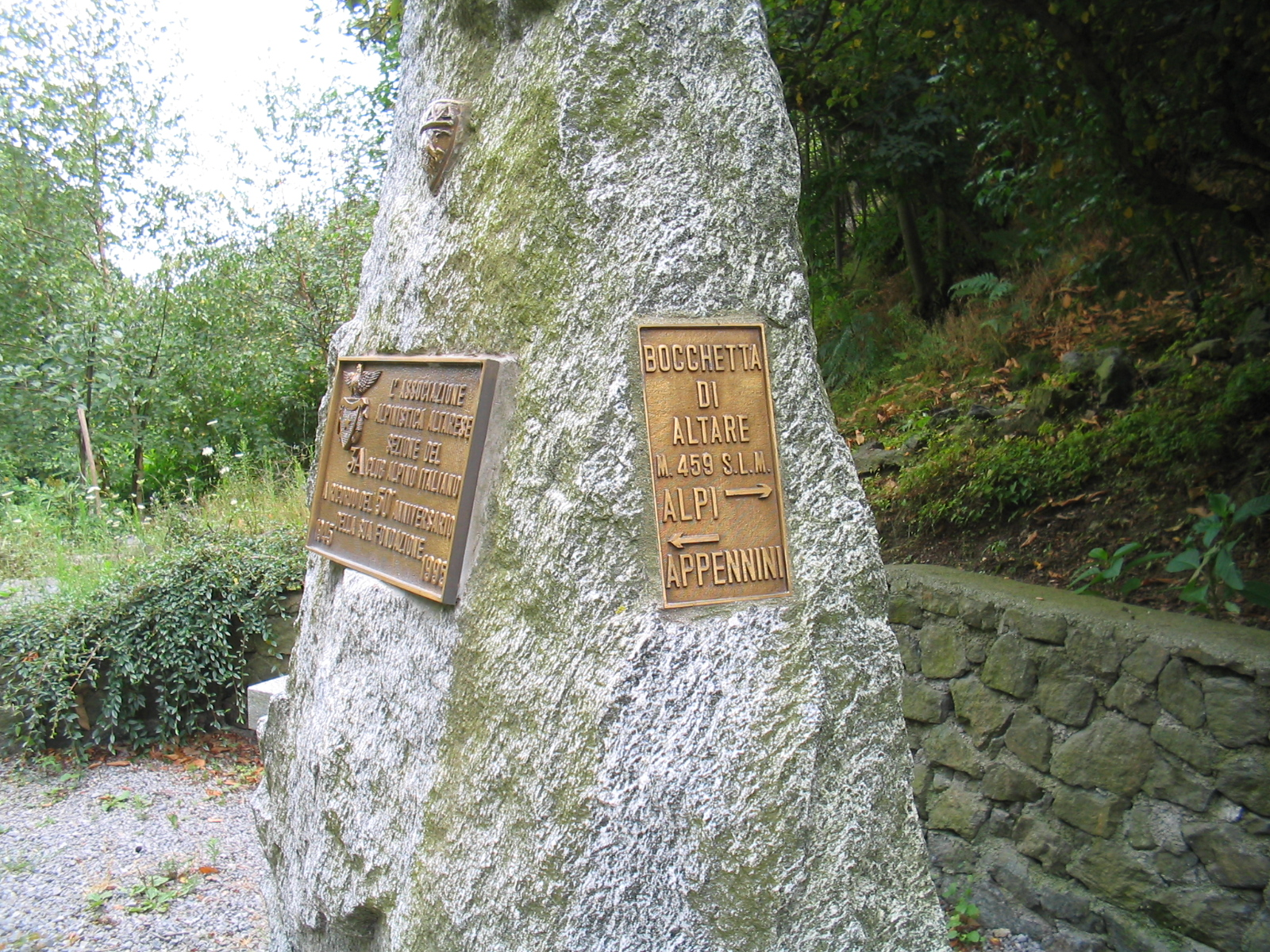 Immagine del monumento eretto dal Comitato Alpino nel punto esatto di divisione tra Alpi e Appennini, sulla Bocchetta di Altare.